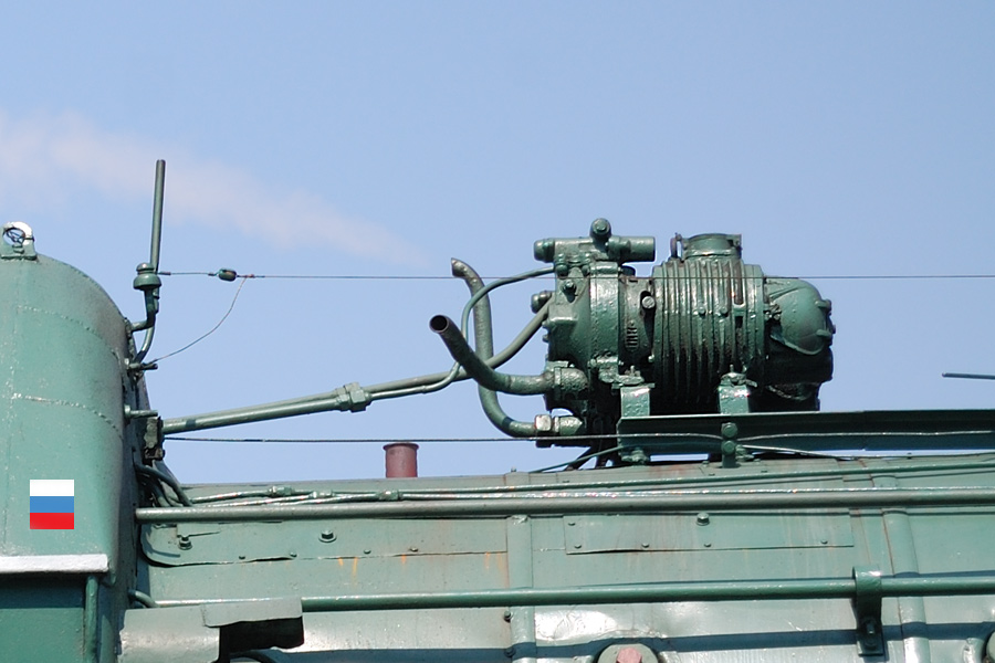 Турбогенератор паровоза ЛВ